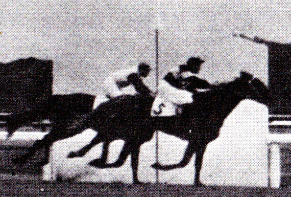 1937東京五歳馬特別（リプルス）